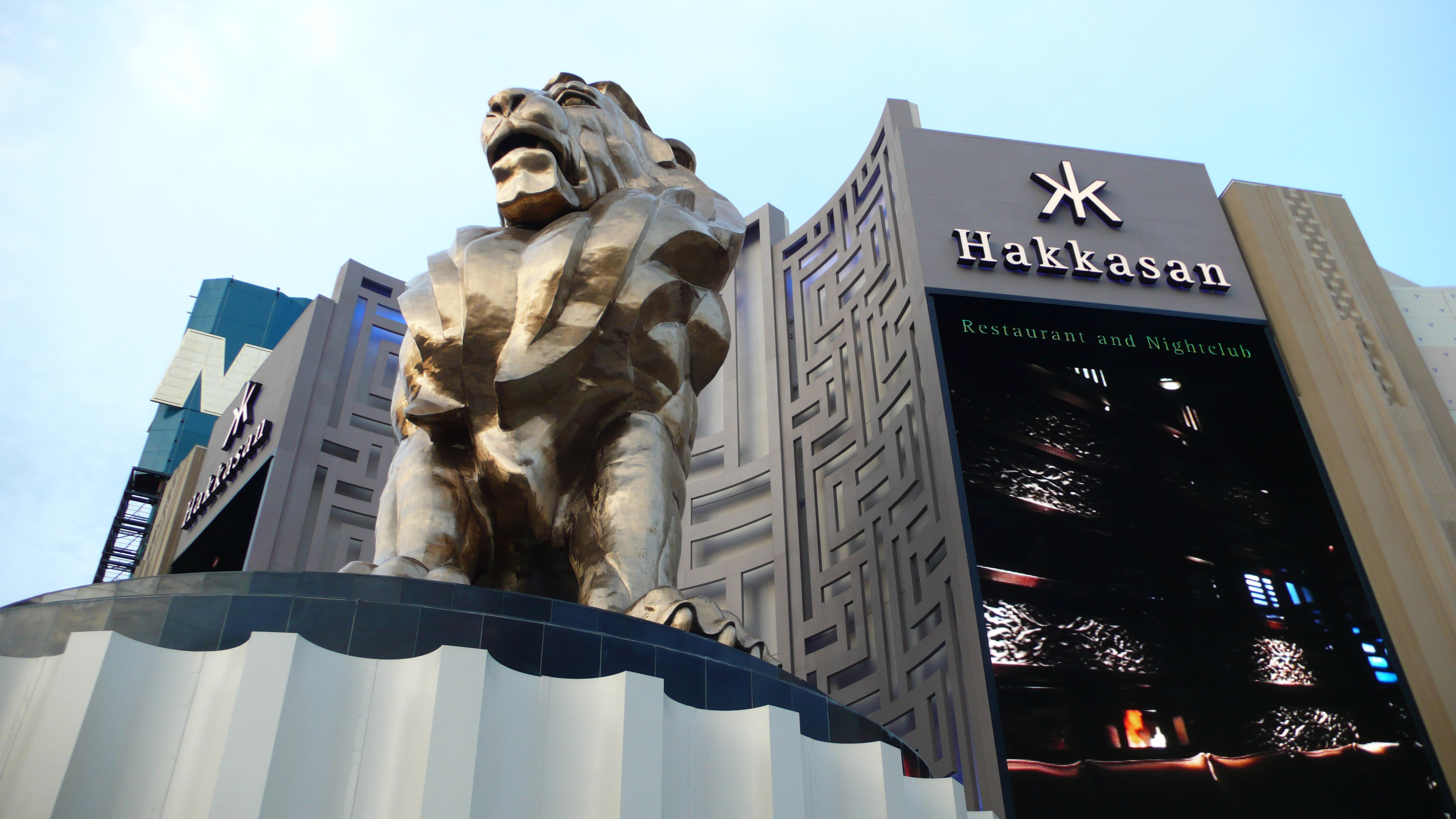 Hakkasan Lion